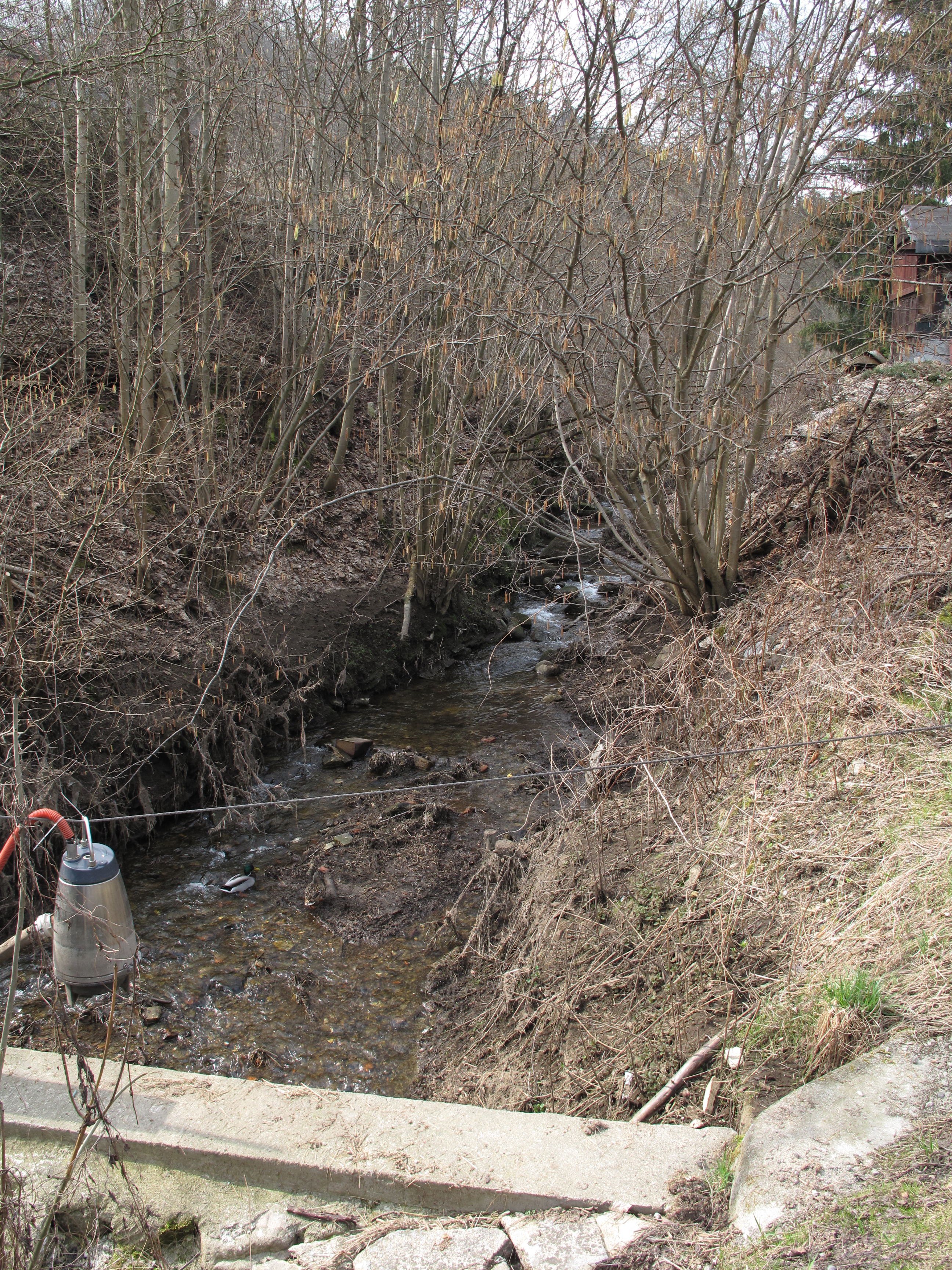 Potok v Plavech. Okres Jablonec nad Nisou, Česká republika.